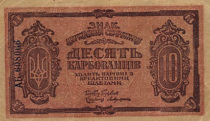 10 karbovanets